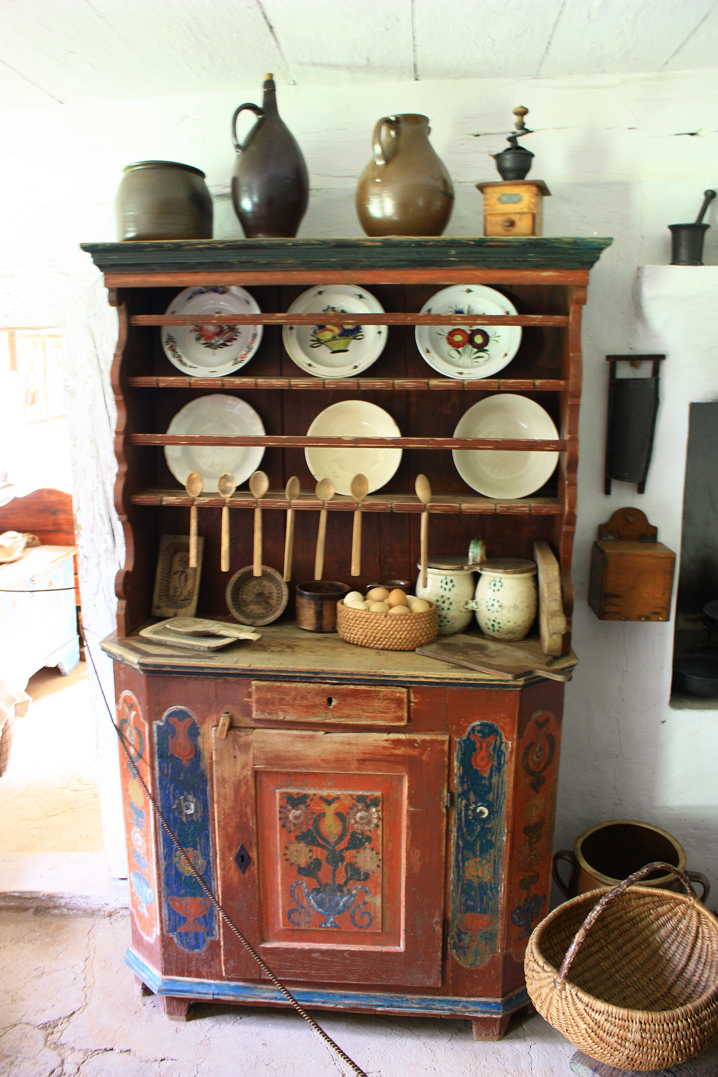 Toruń - Park Etnograficzny - wnętrze chaty